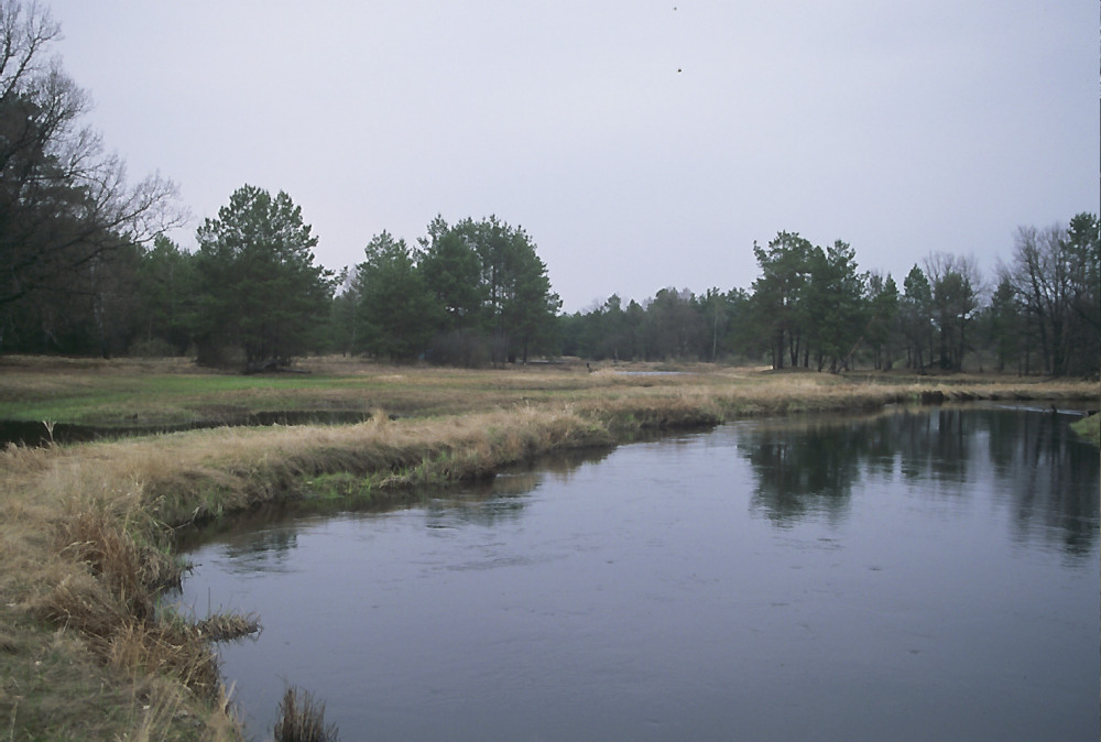 Widok na rzekę Stwigę w okolicach wsi Dzierżyńsk. Białoruś - Polesie Prypeckie.